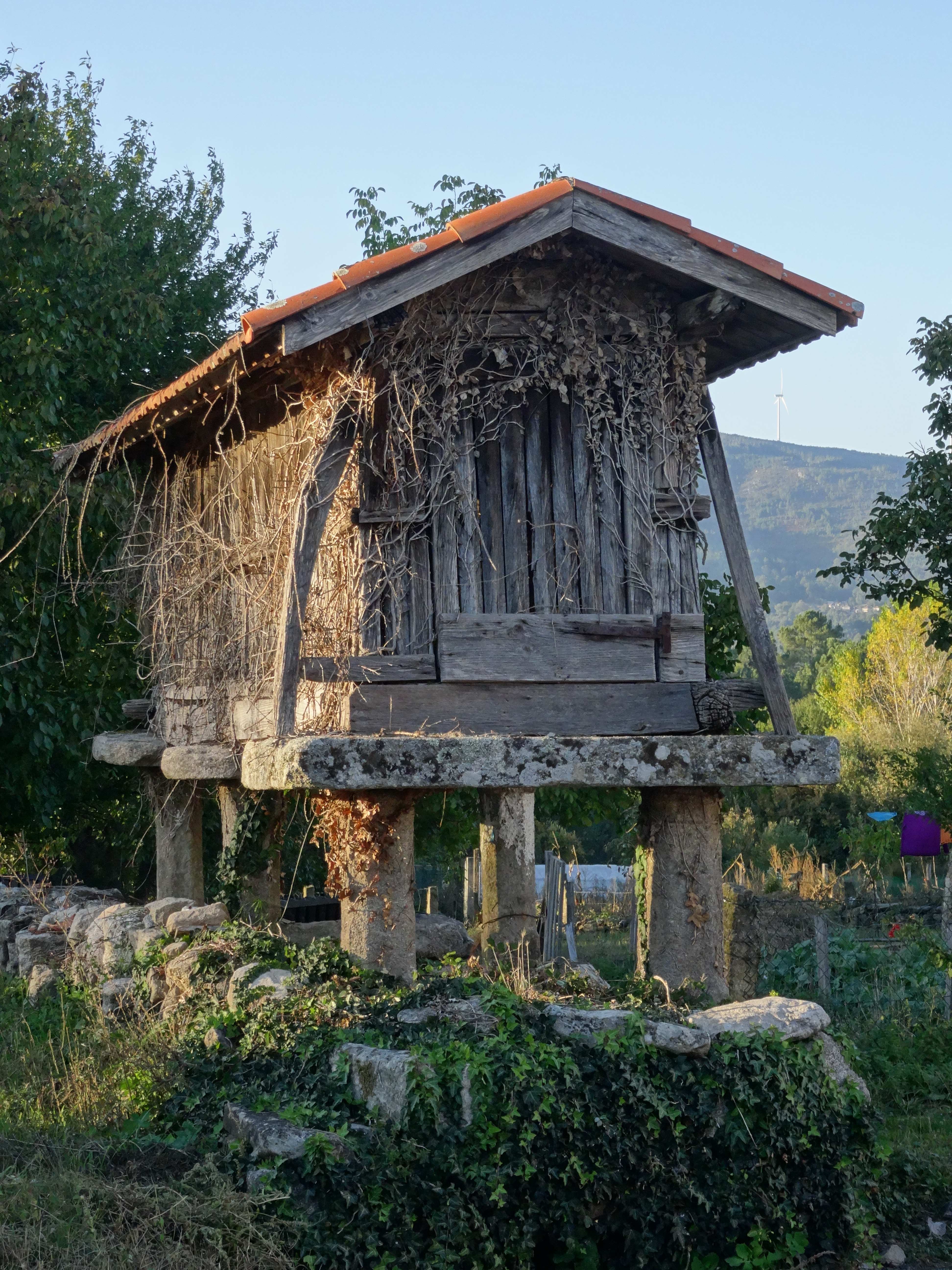 Ver título.